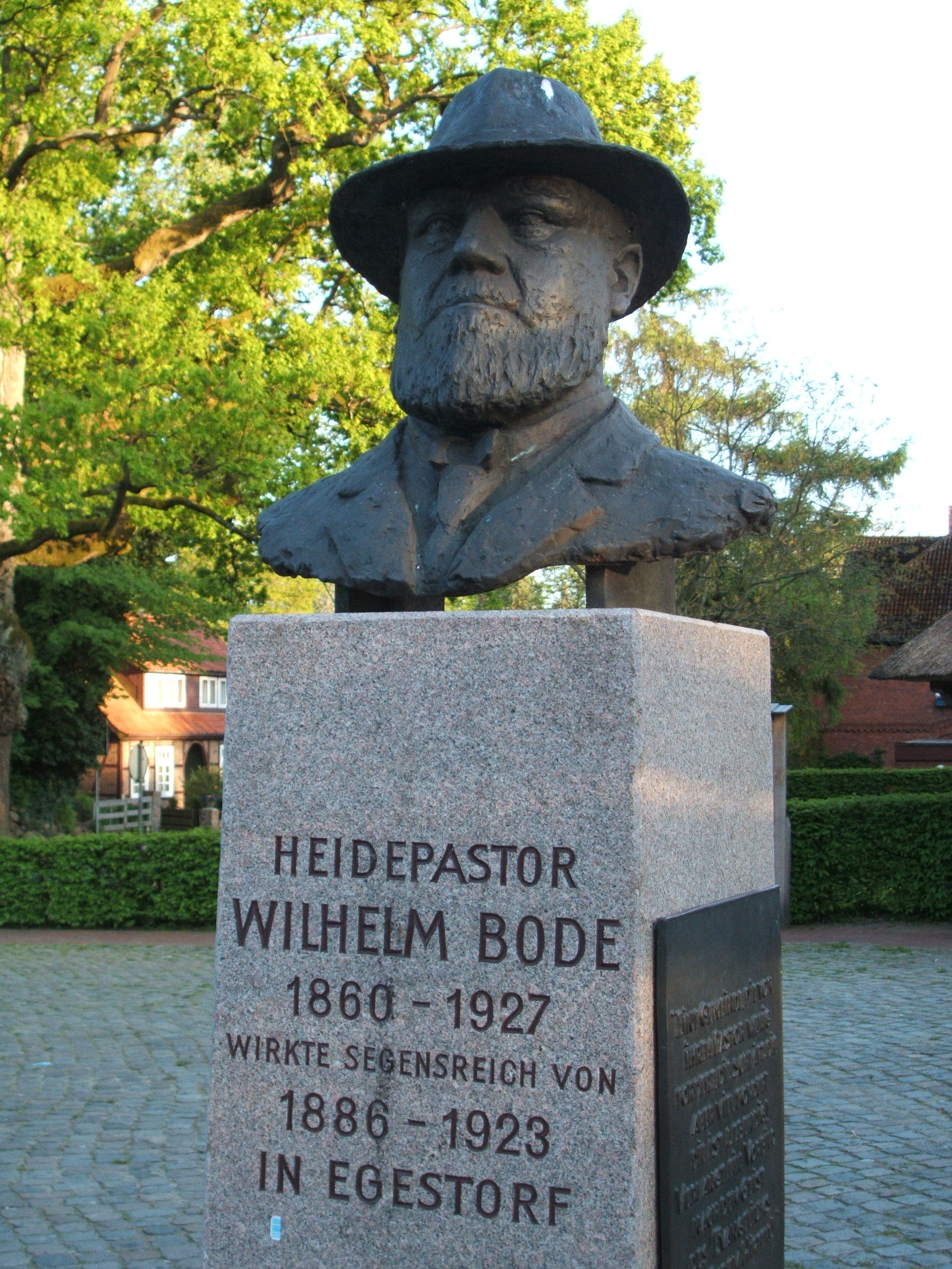 Denkmal des „Heidepastors“ Wilhelm Bode (1860-1927)